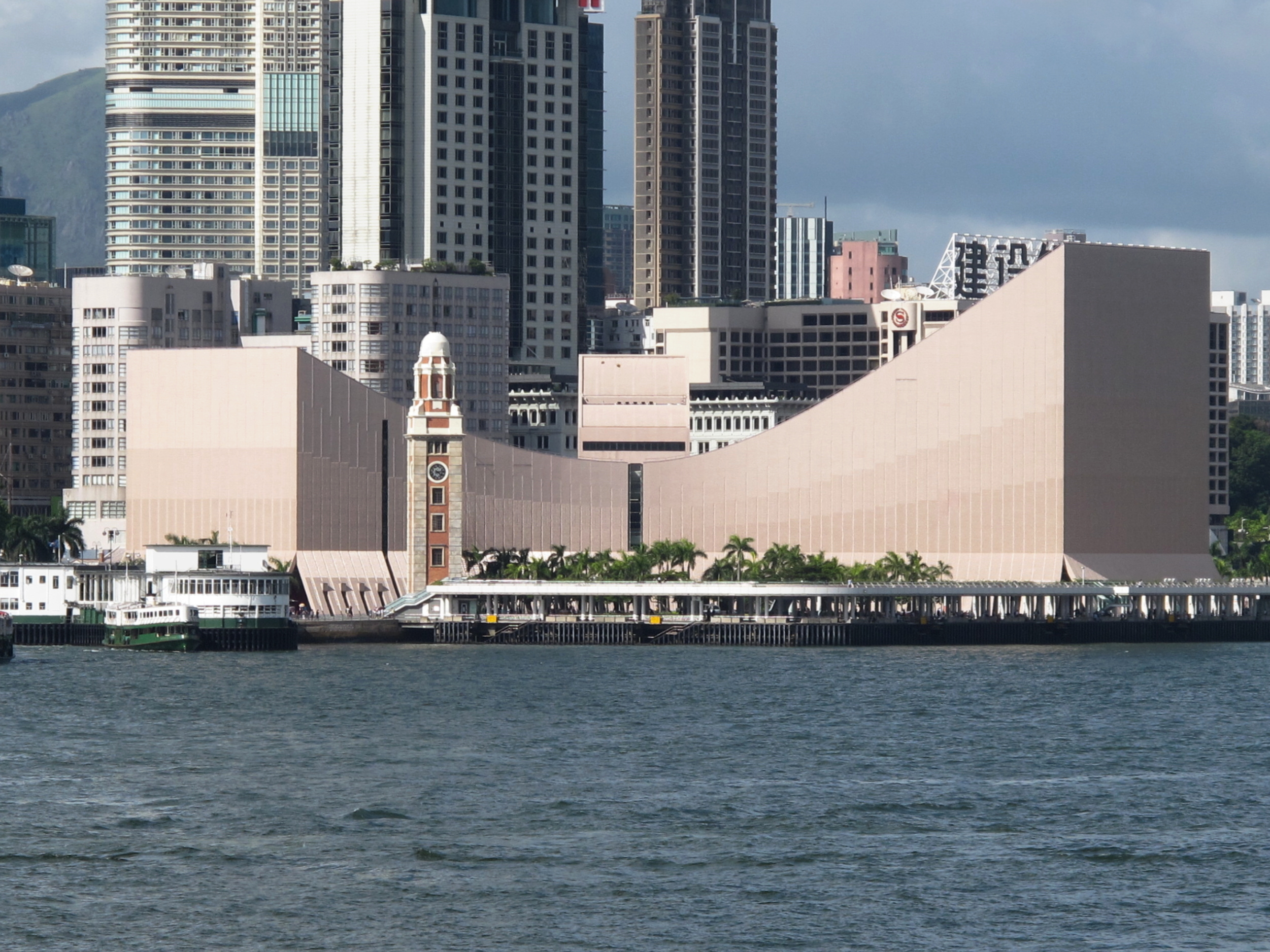 HK Cultral Centre 香港文化中心